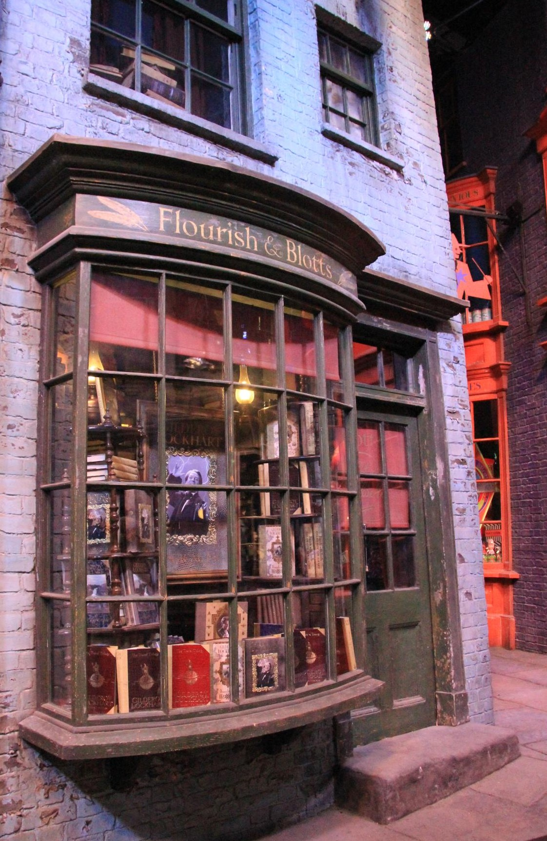 Fleury et Bott (recadrage)